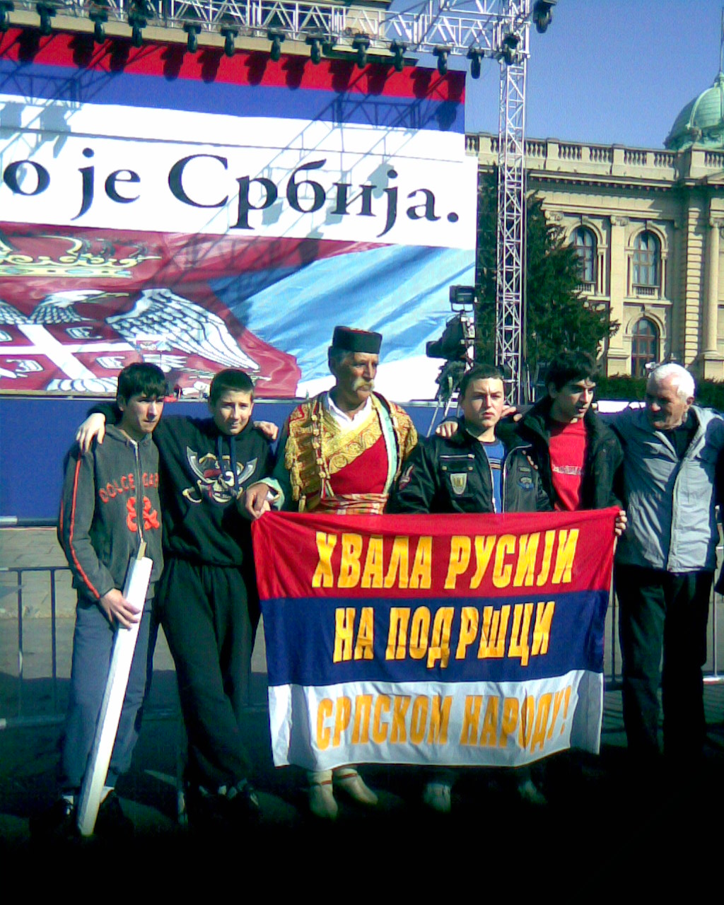 'Kosovo is Serbia' rally